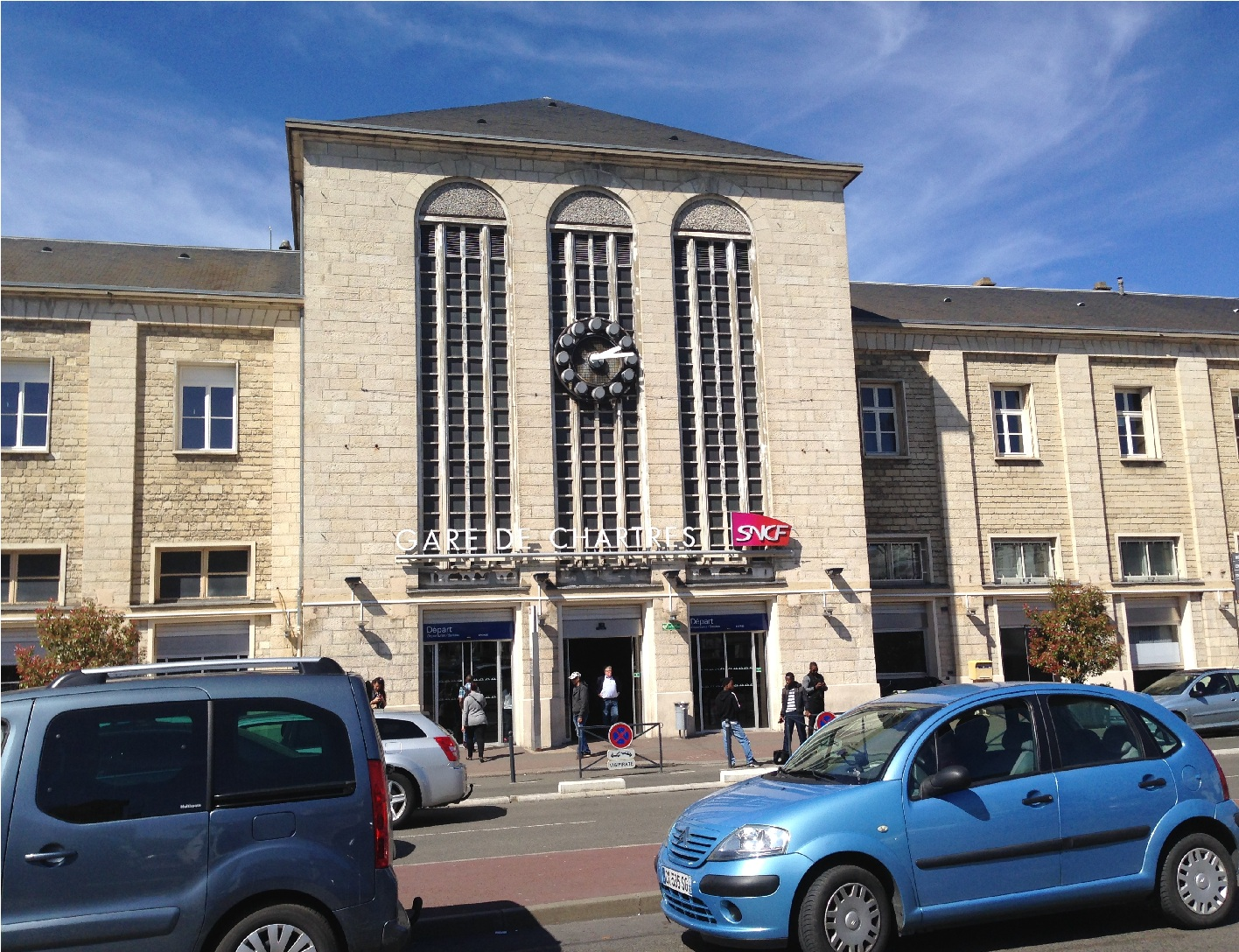 沙特尔站（Gare de Chartres）